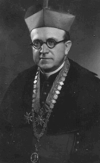 František Cinek (1888 - 1966), Český římskokatolický kněz.